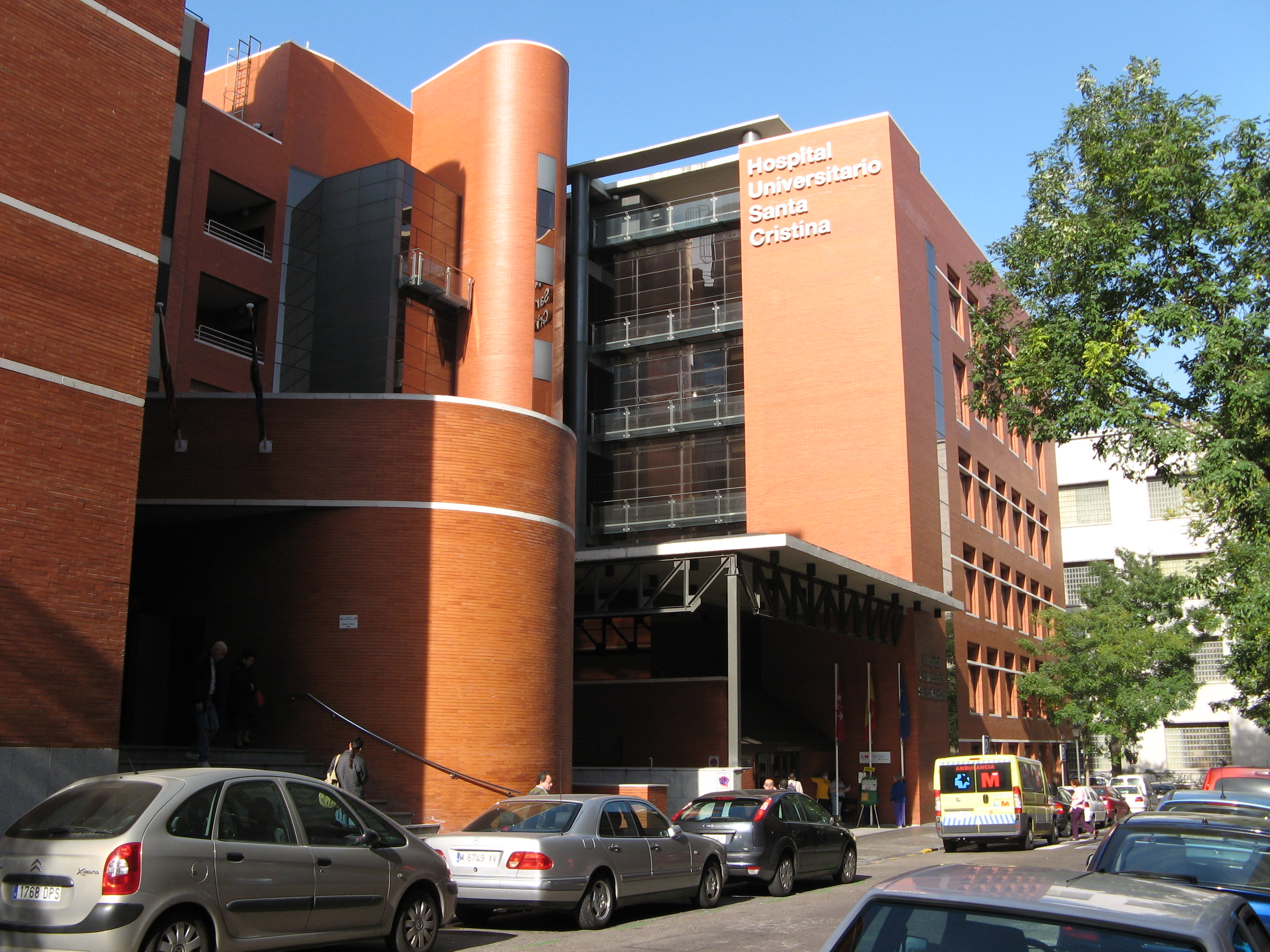 Zona moderna del Hospital de Santa Cristina. Entrada por la calle Maestro Vives, Madrid, España.